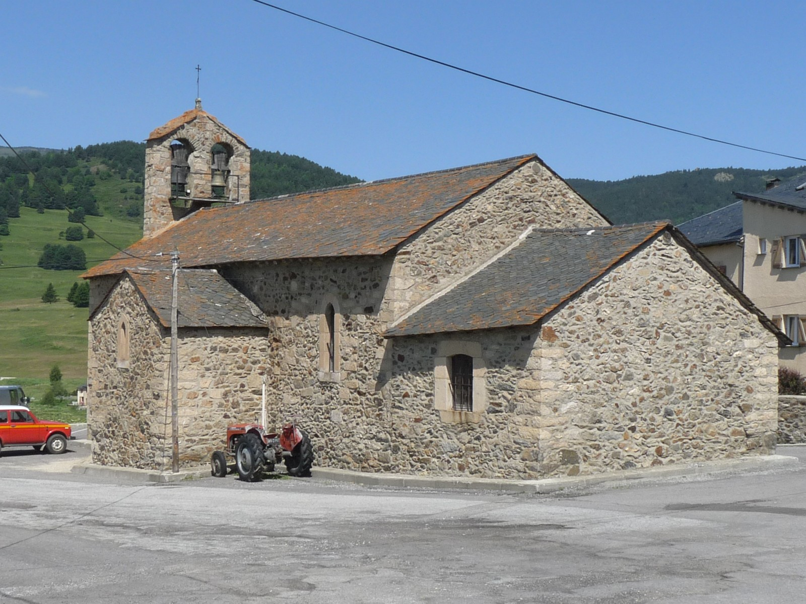 Eglise de Puyvalador, Pyrénées-Orientales, France